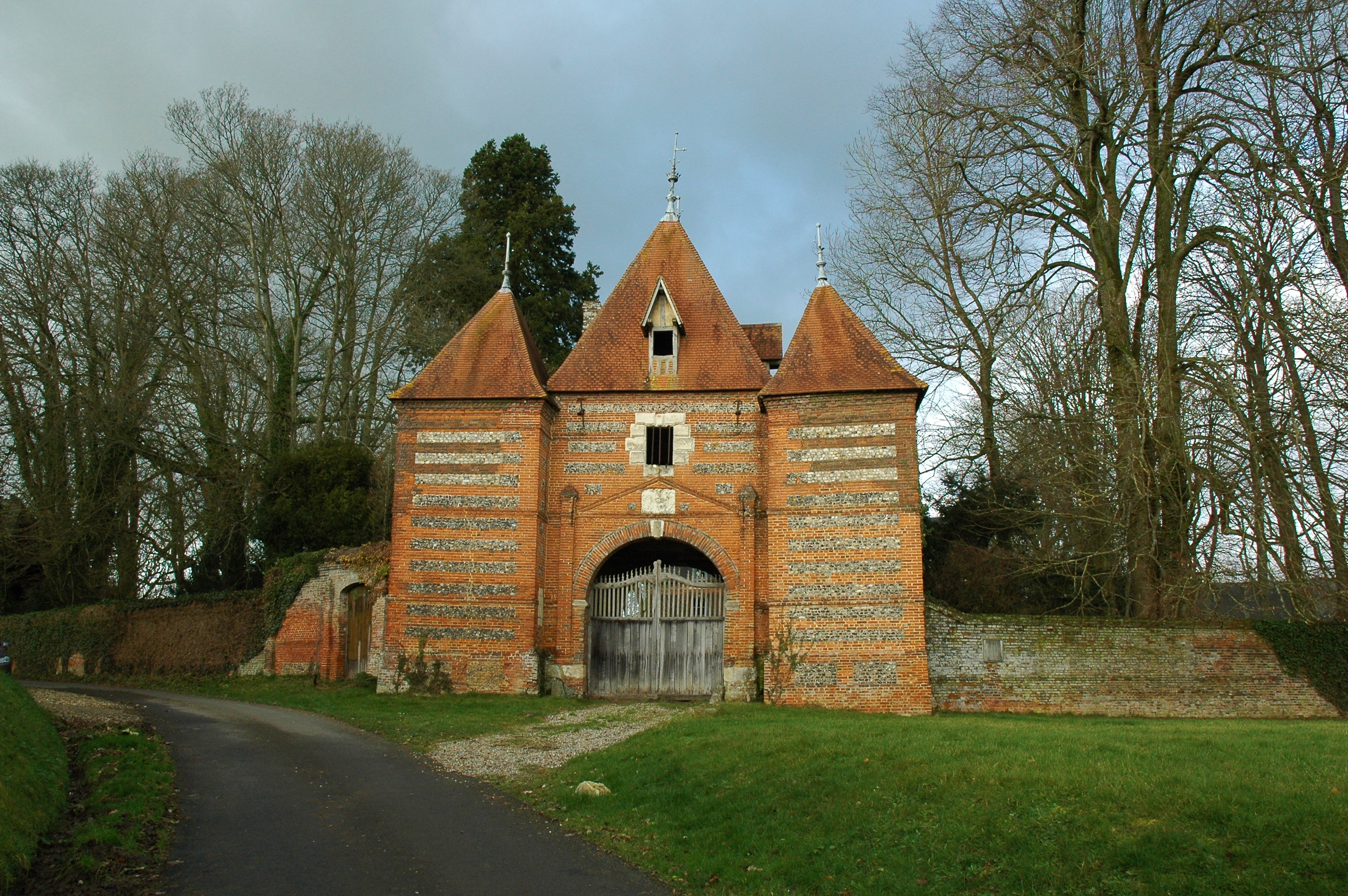 Auvilliers (Seine-Maritime, France). Le portail du château. .